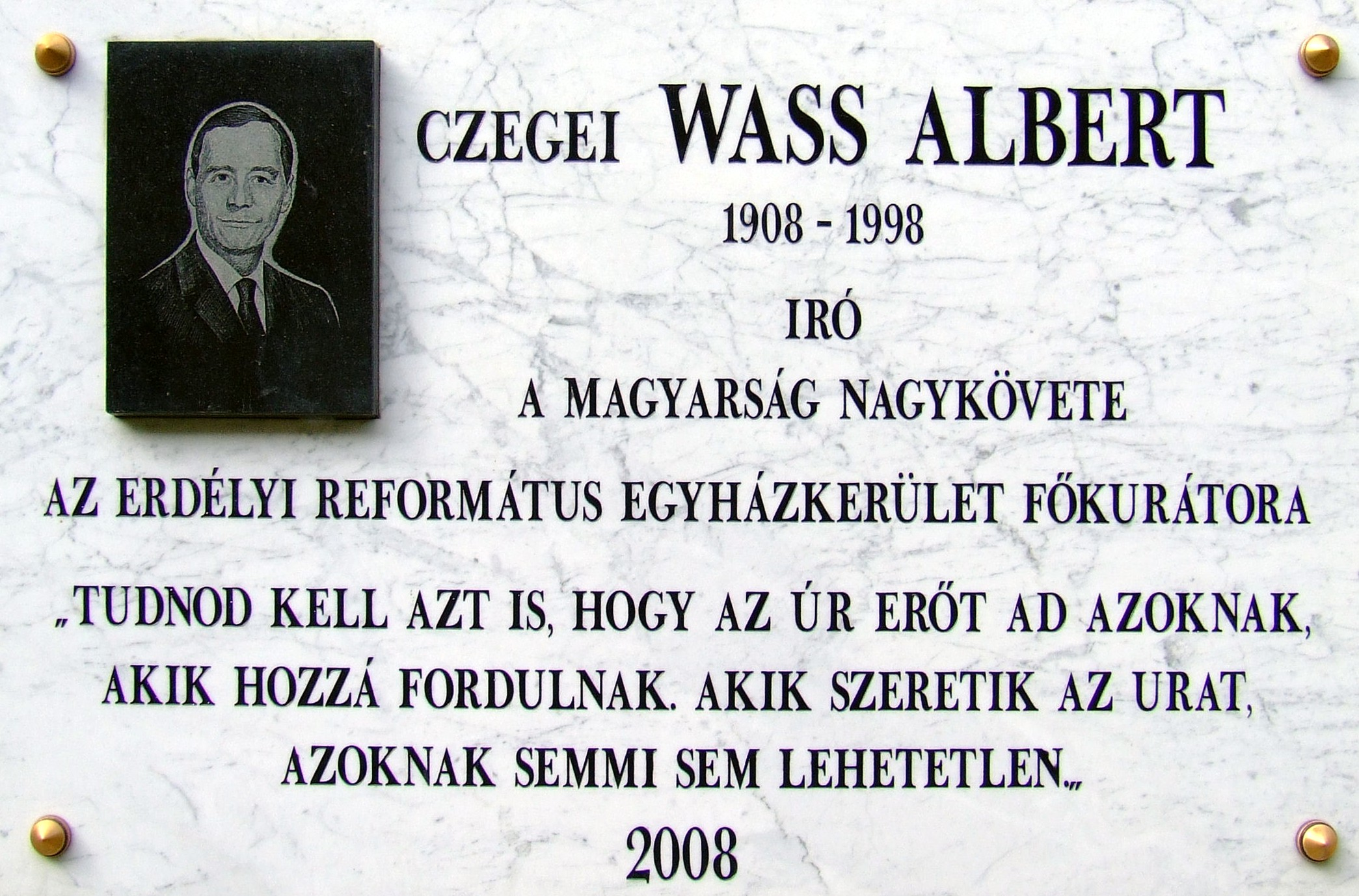 Wass Albert-emléktábla a kőbányai református templom falán